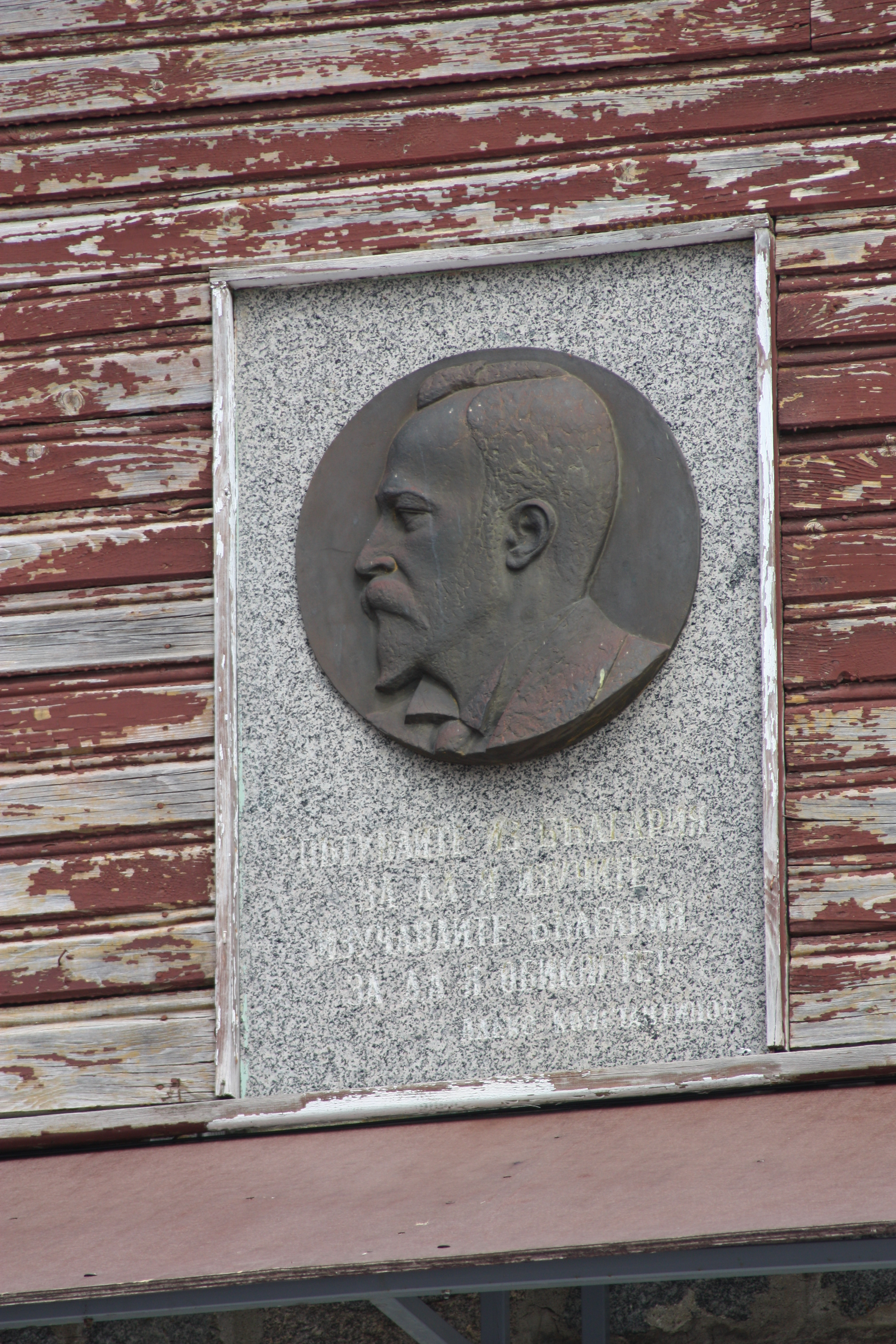 Vitosha mountain Aleko, Sofia, Bulgaria, Witoschagebirge, Витоша